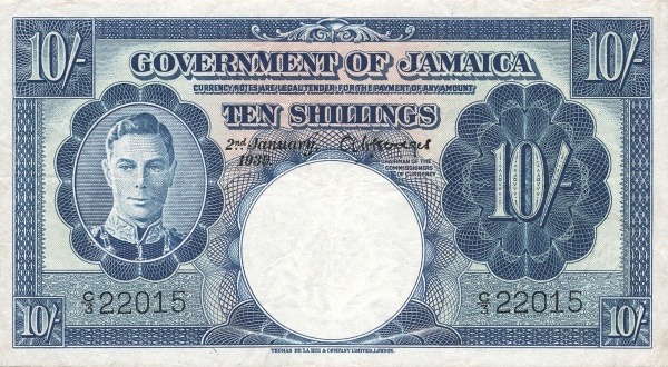 10 shillinges jegy előoldala.